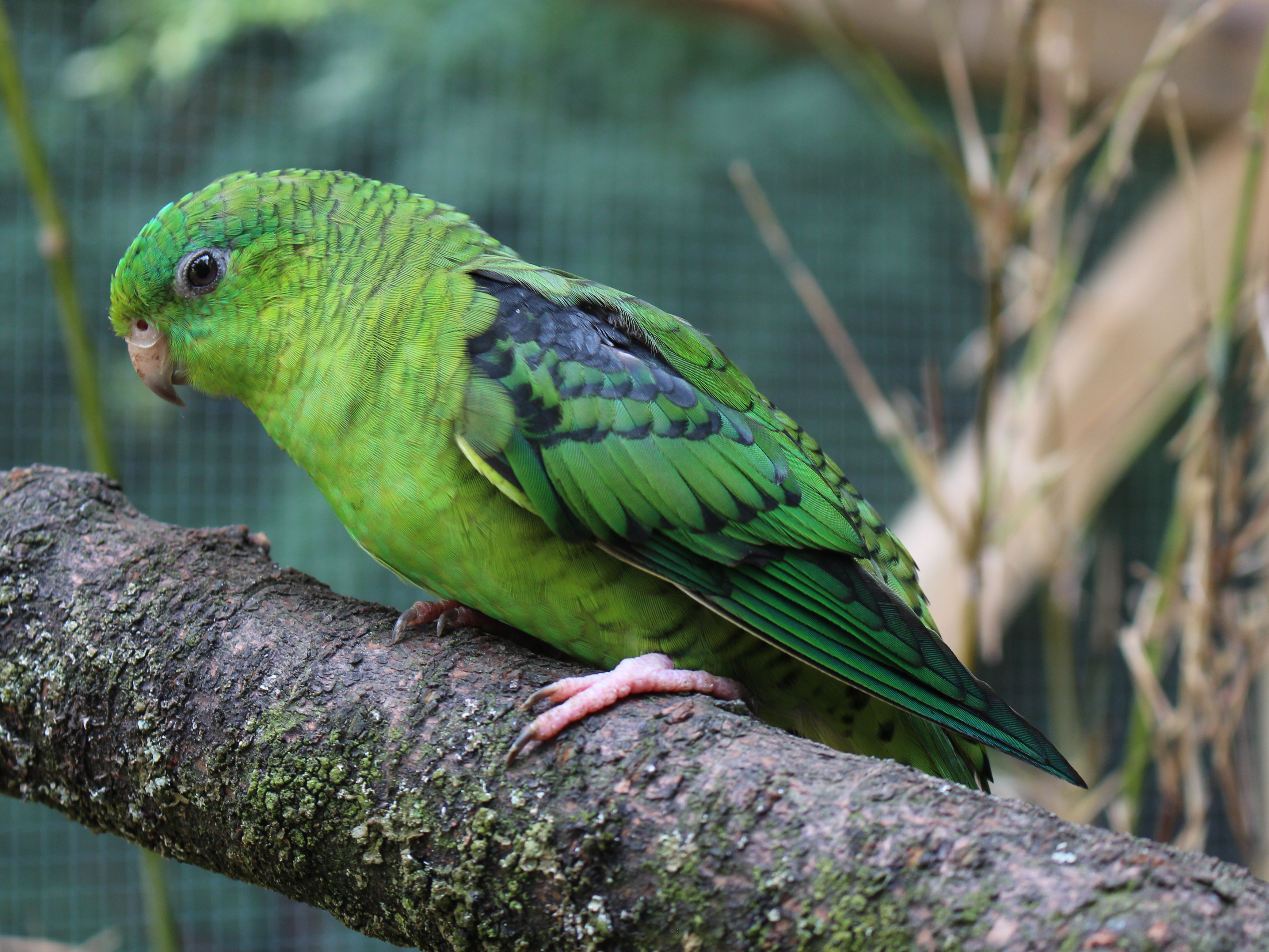 Katharinasittich